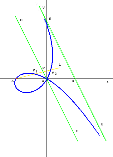 Косая строфоида